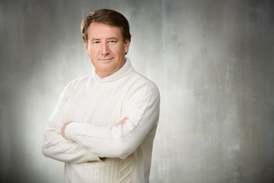 Олександр Клименко